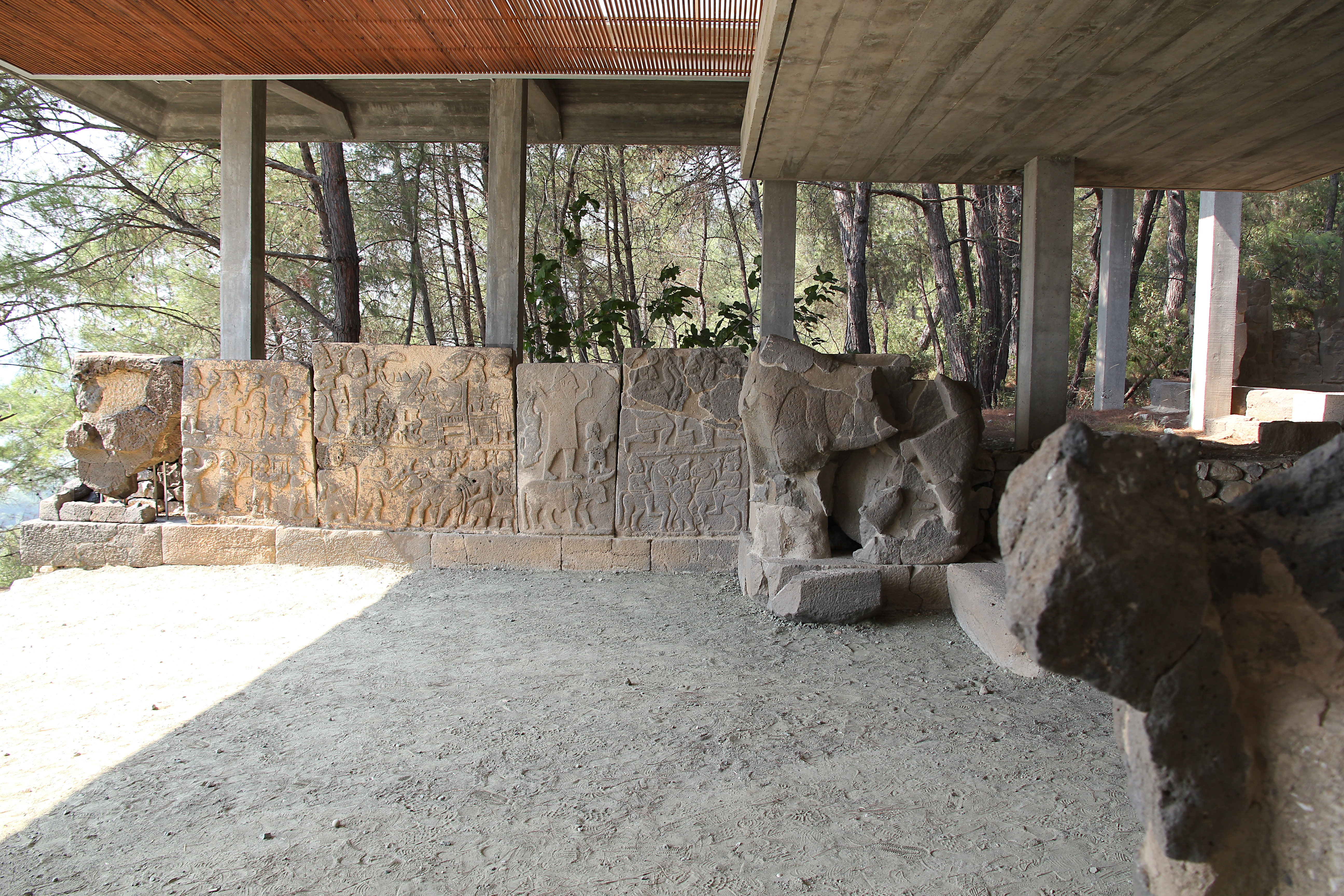 Karatepe (Asatiwataya), neo-hethitischer Fundort bei Osmaniye, Südtürkei, Südtor, Vorhof links